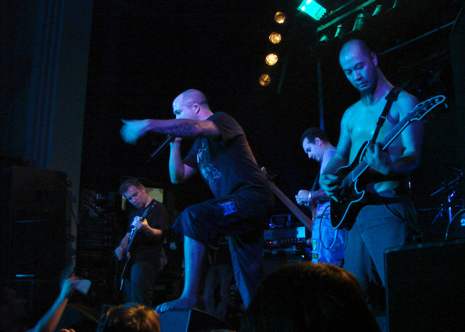 Benighted au Coolness'tival 2007, le 3/11/07 à Montdidier (60).